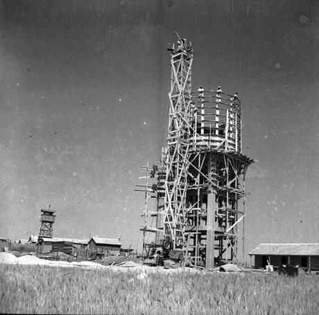 1941 – הקמת מגדל המים